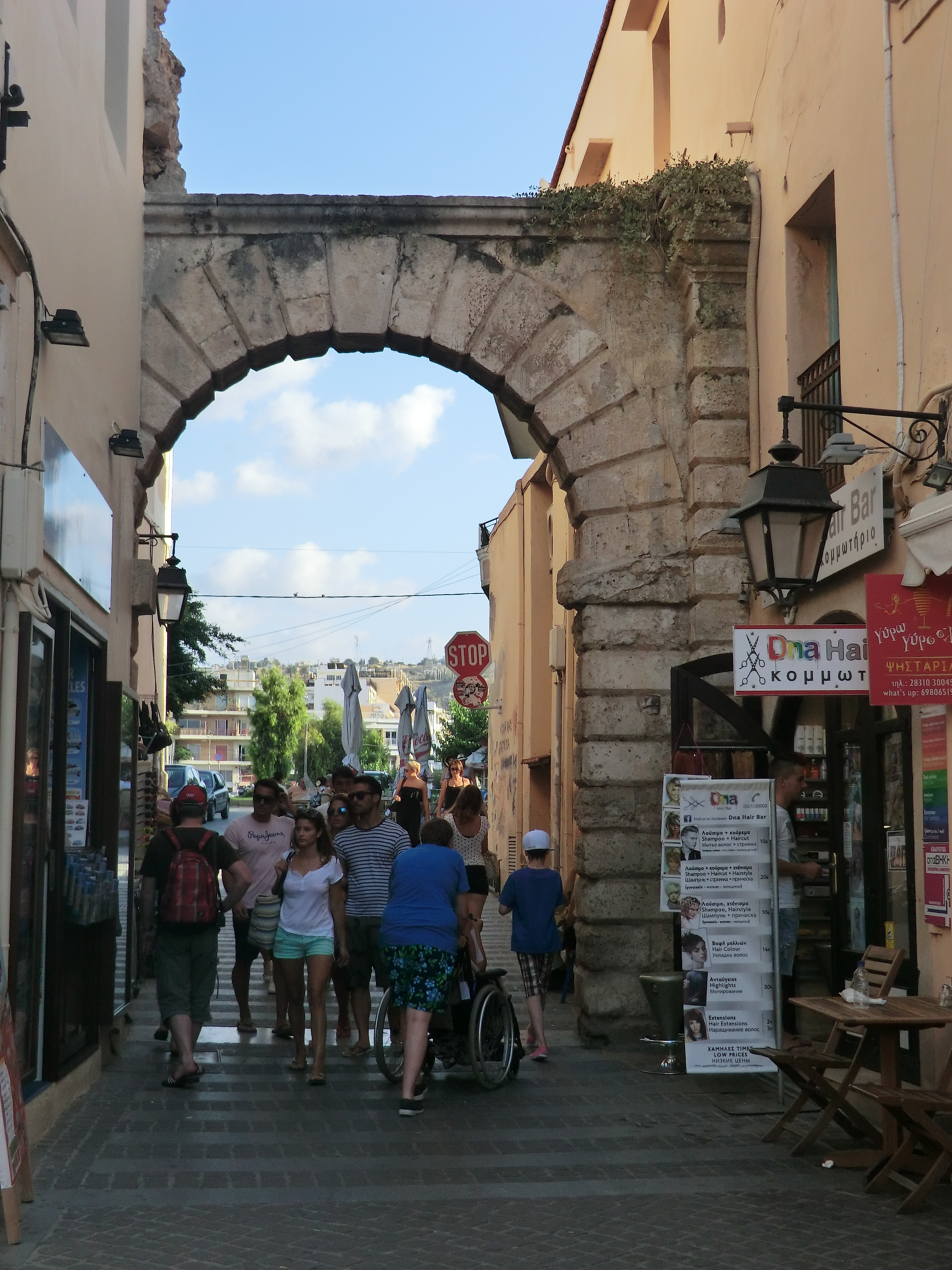 Porte Guora à Réthymnon.